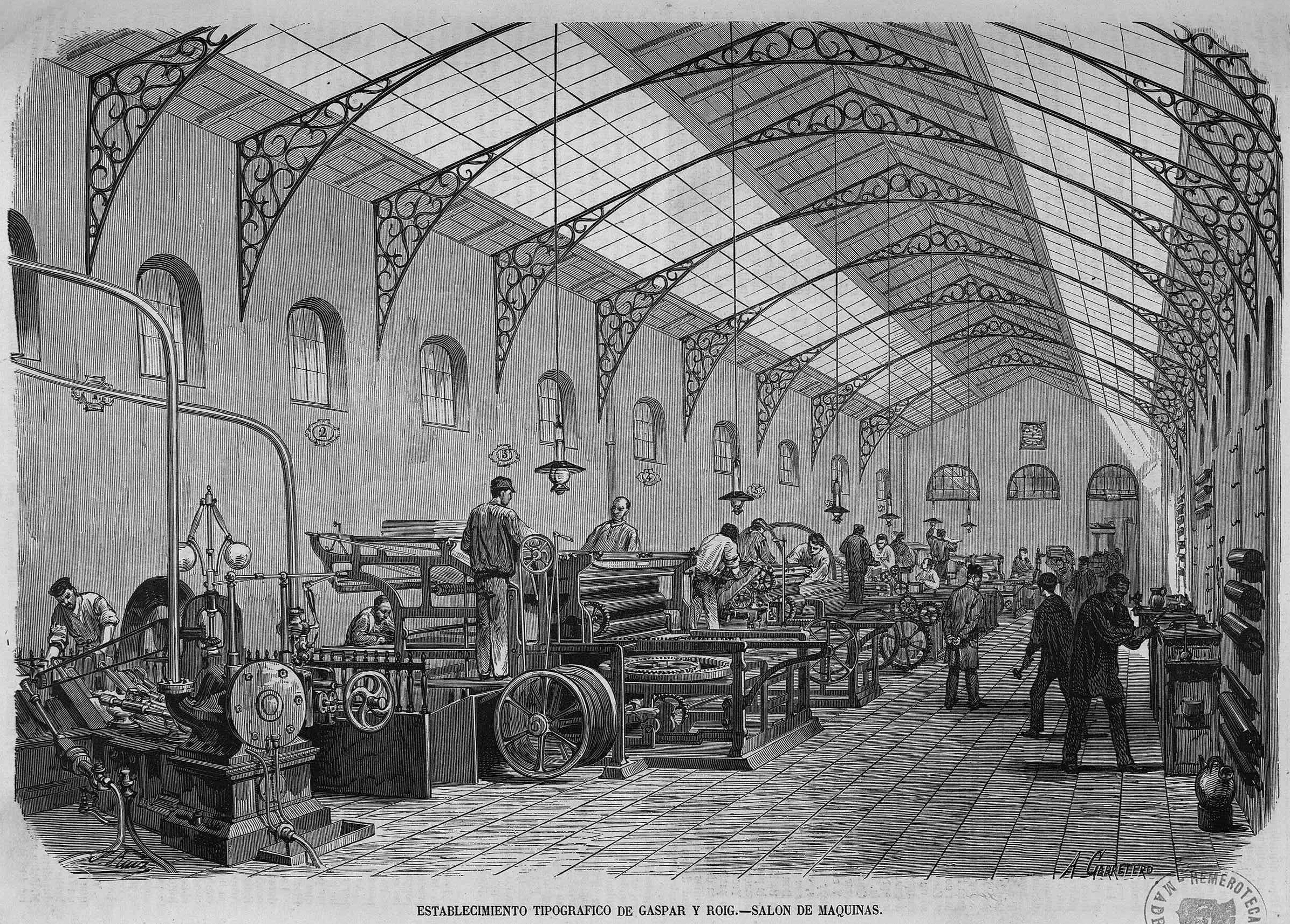 Establecimiento tipográfico de Gaspar y Roig, salón de máquinas, en la revista española El Museo Universal.